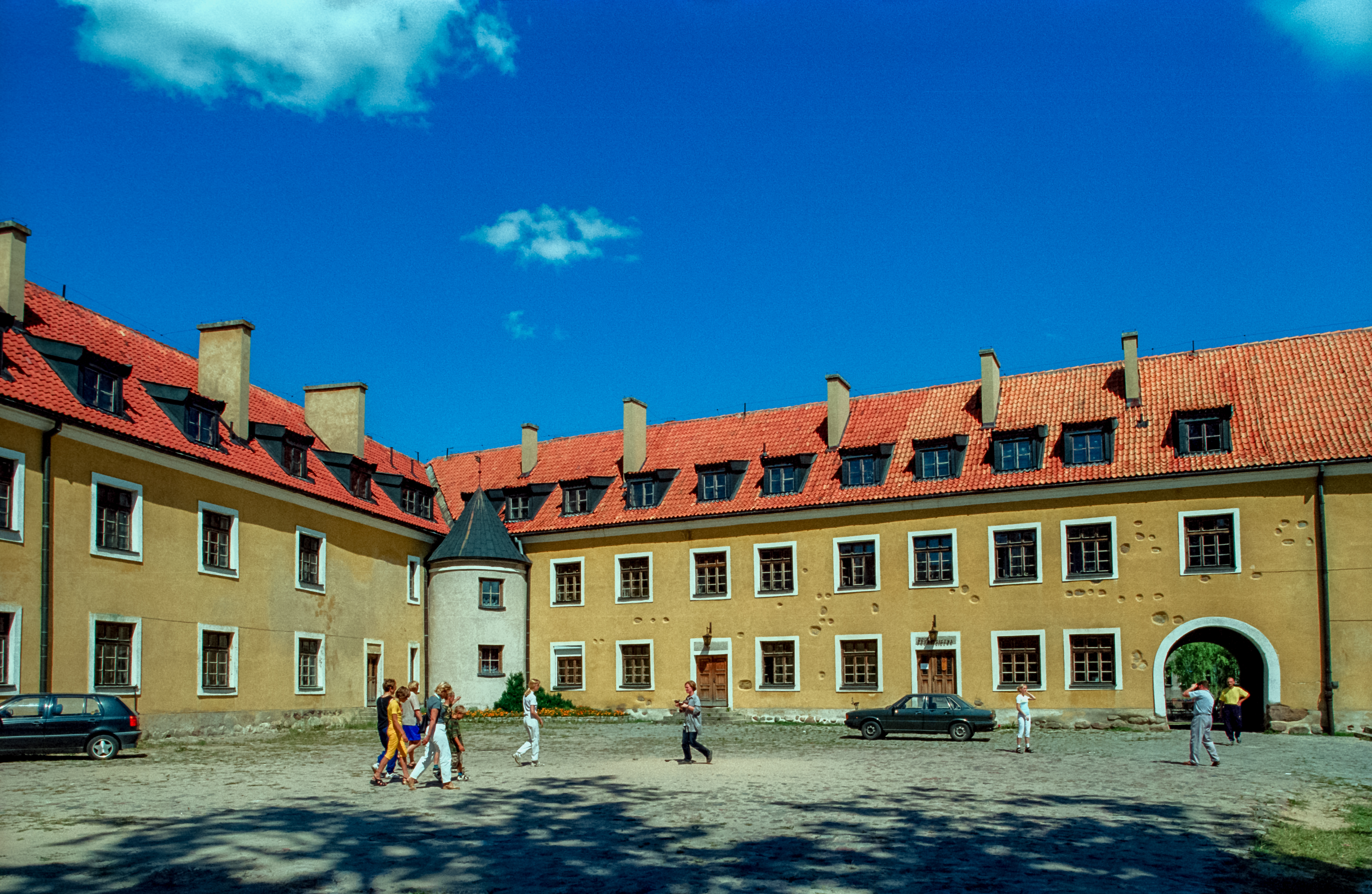 Węgorzewo